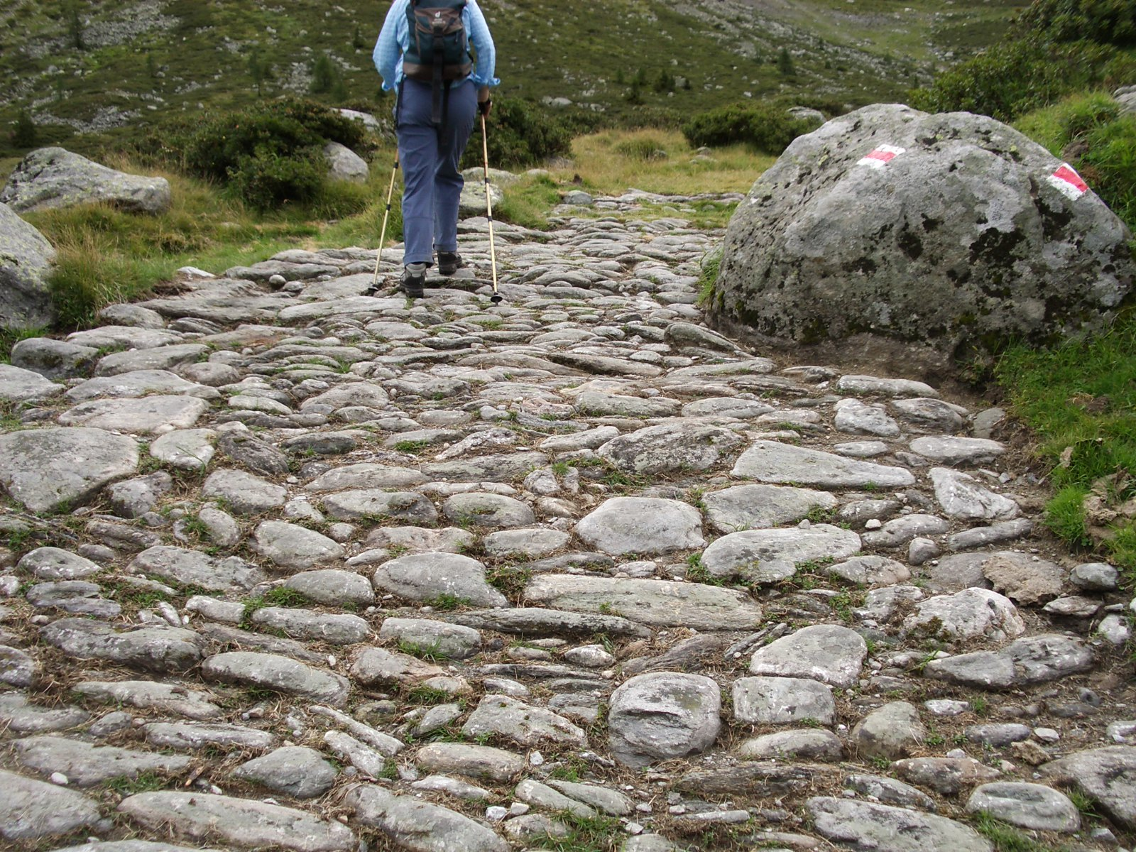 Splügenpass GR, Switzerland